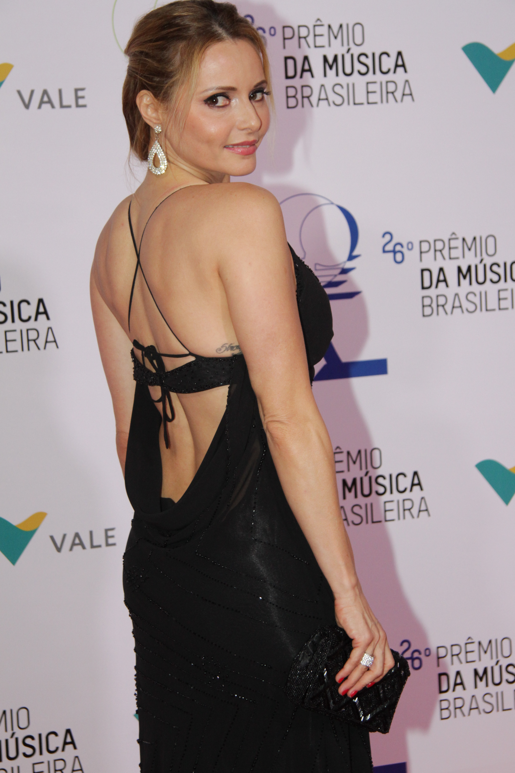 Rita Guedes - 26° Prêmio da Música Brasileira 2015, no Theatro Municipal, no Centro do Rio de Janeiro/RJ. (10/06/15) Foto: Roberto Valverde/Divulgacão